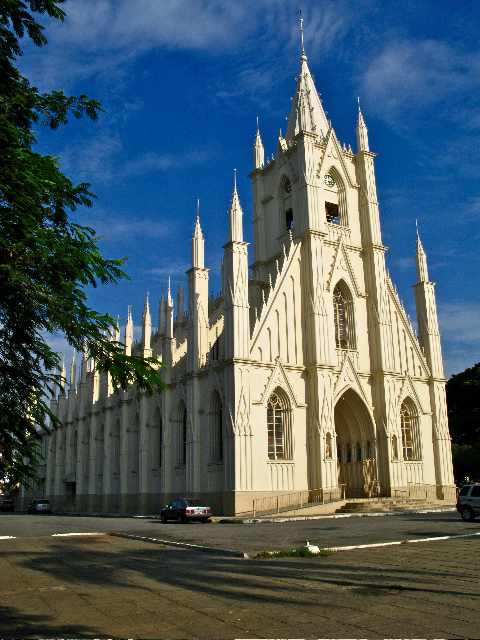 Igreja de Santa Teresinha Taubaté SP